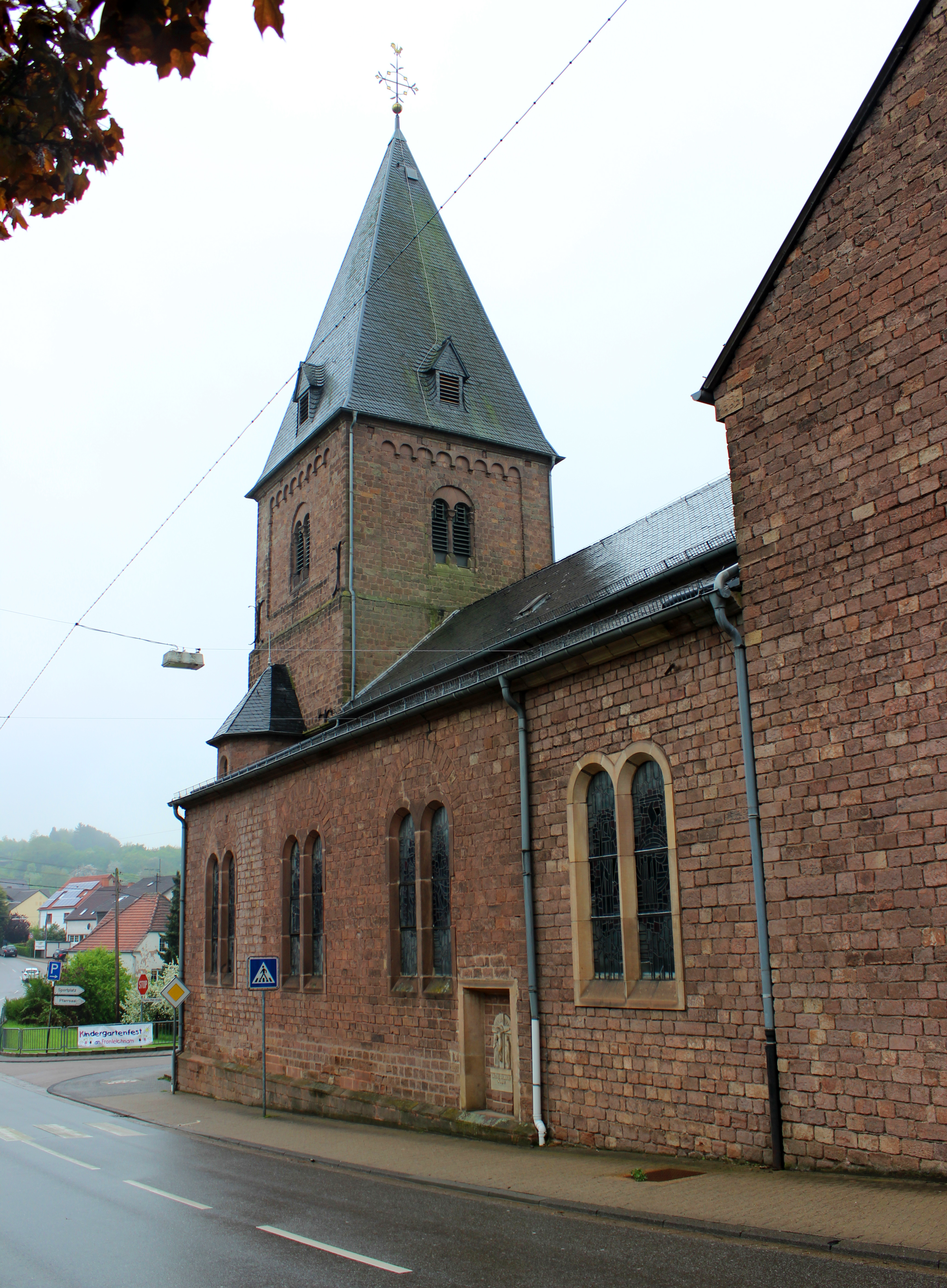 Die katholische Pfarrkirche Mariä Himmelfahrt in Humes, einem Ortsteil der Gemeinde Eppelborn, Landkreis Neunkirchen, Saarland.